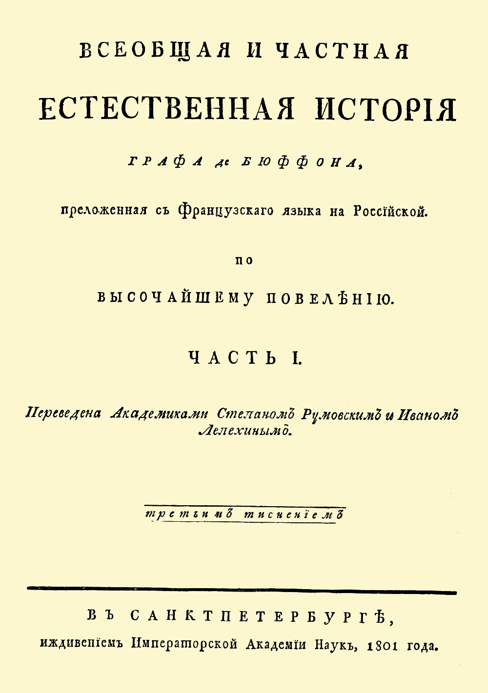 Титульный лист. Граф де Бюффон Всеобщая и частная естественная история. Перевод акад. С. Румовский и И. Лепёхин. Ч. 1. Санктпетербург: Императорская Академия наук, 1801. (3 издание с прибавлениями. и правками). 380 с.